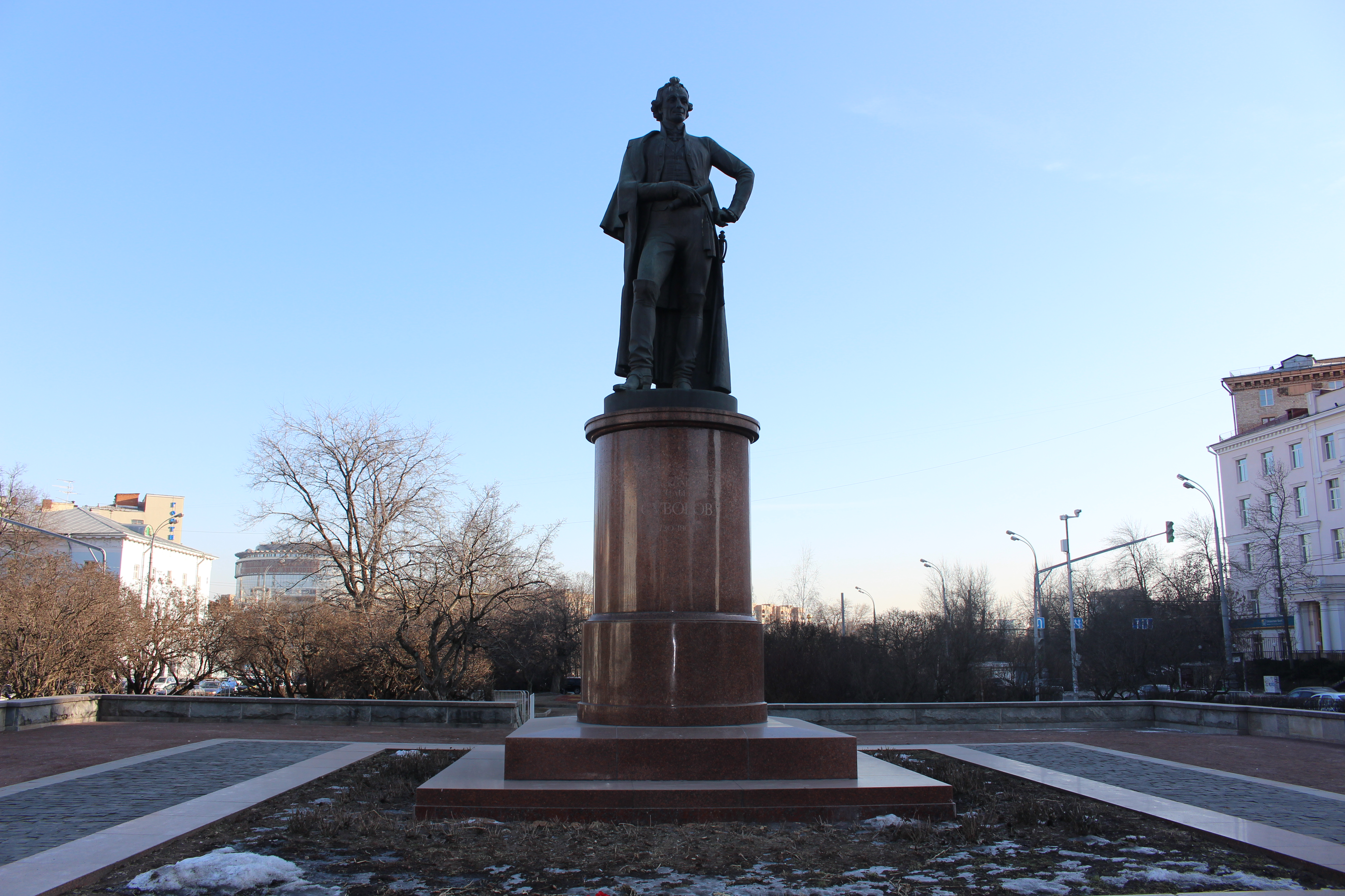 Памятник Суворову А.В.